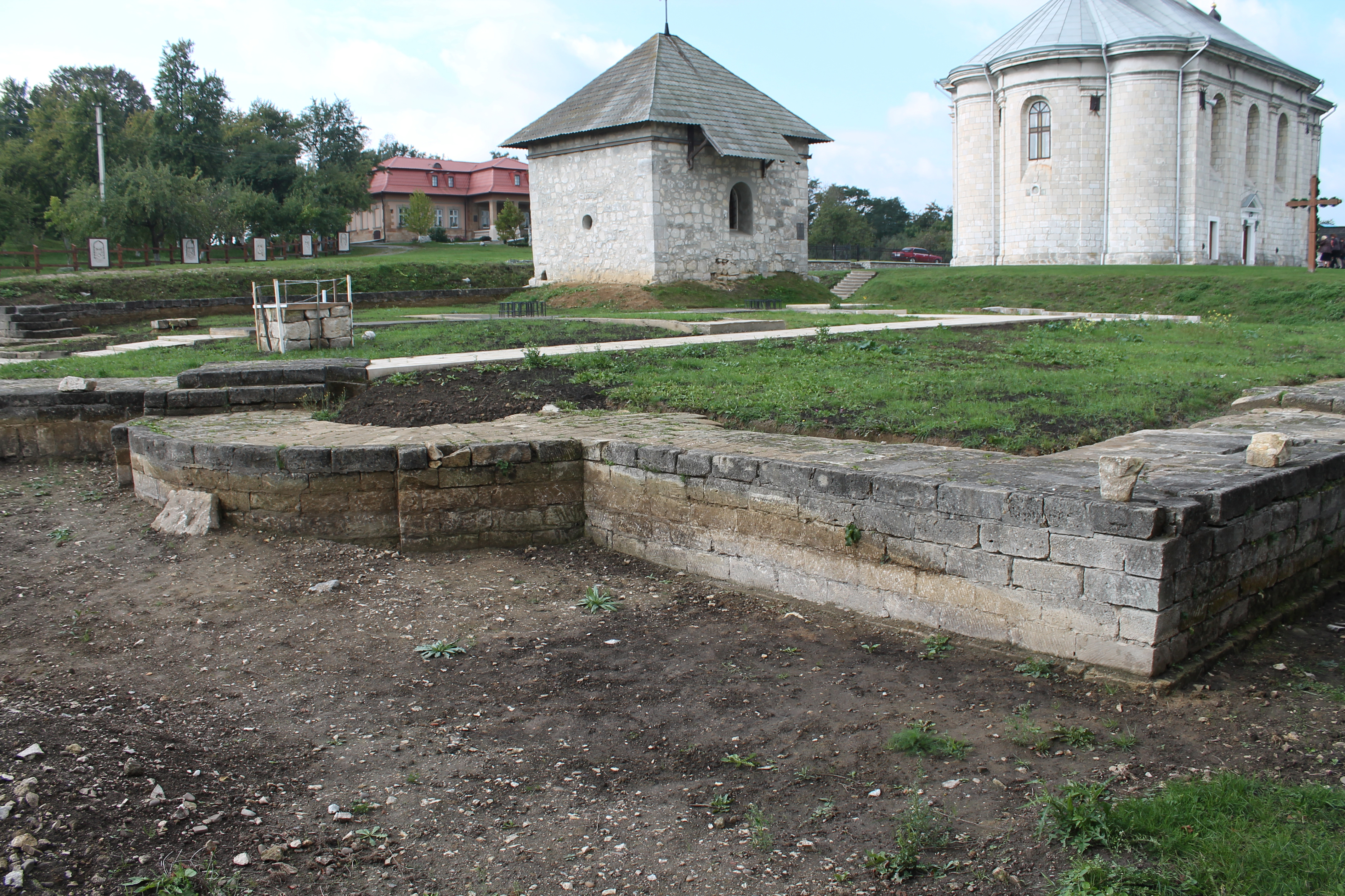 Фундаменти собору Успіння Пресвятої Богородиці, Крилос, Княжа Гора